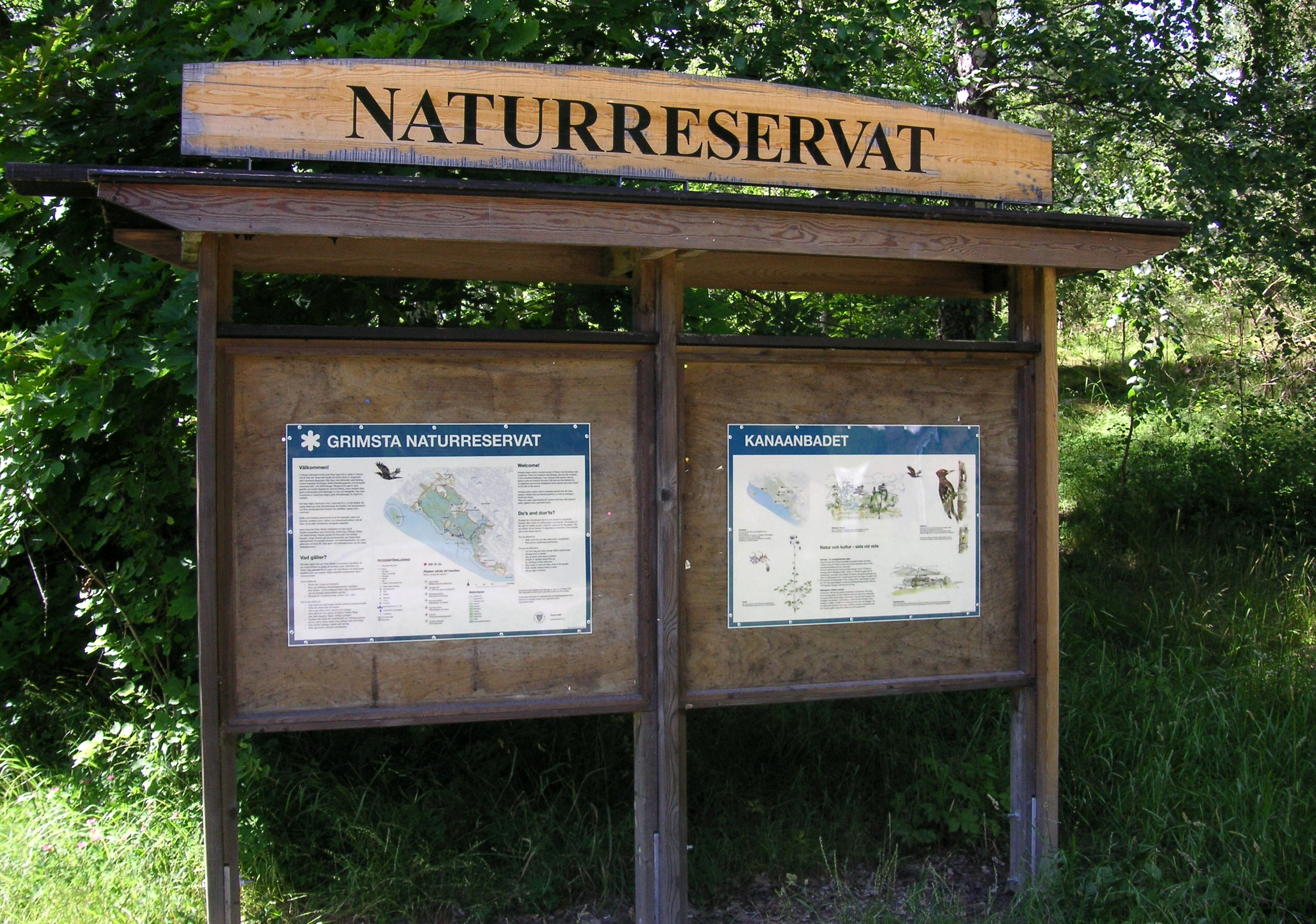 Grimsta naturreservat, Stockholm, informationstavla